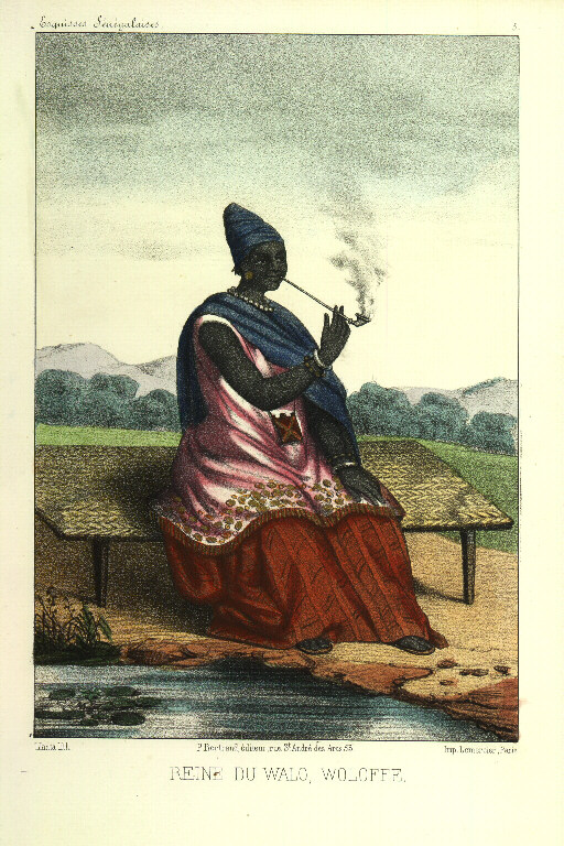 Ndeté-Yalla, Reine du Walo, en tenue royale. Sénégal